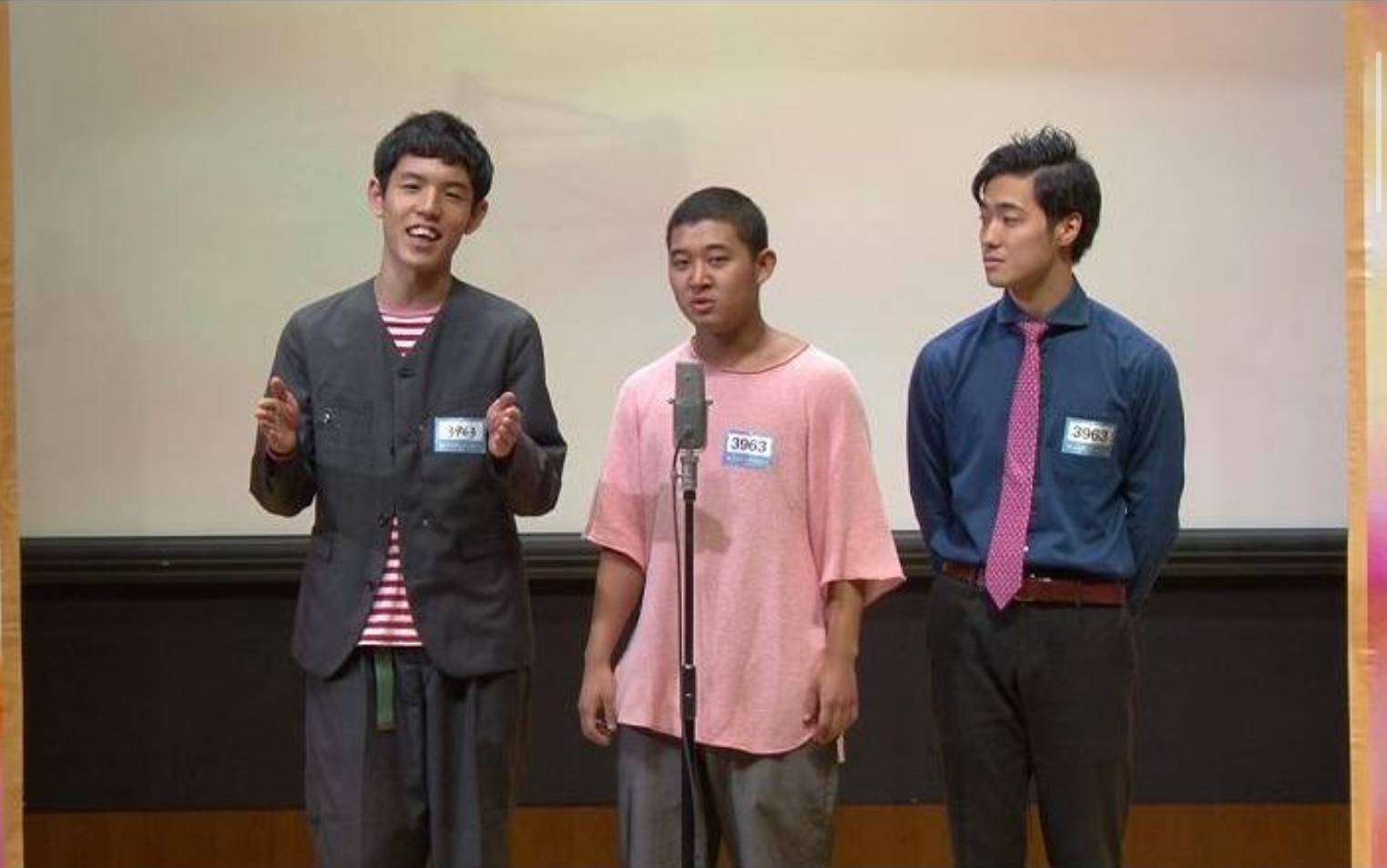 M1グランプリにて、左から都築拓紀、後藤拓実、石橋遼大